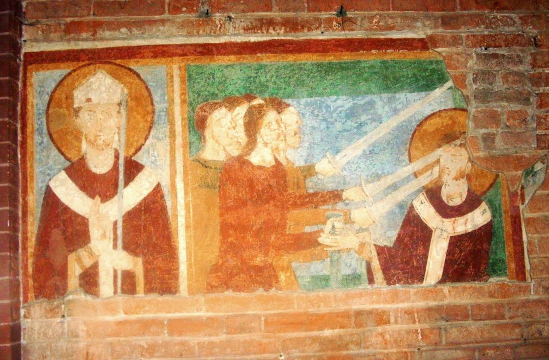 Affresco della morte di Thomas Becket a Canterbury, l'affresco si trova nella chiesa di San Lanfranco di Pavia - a sinistra affresco con la figura di San Lanfranco benedicente